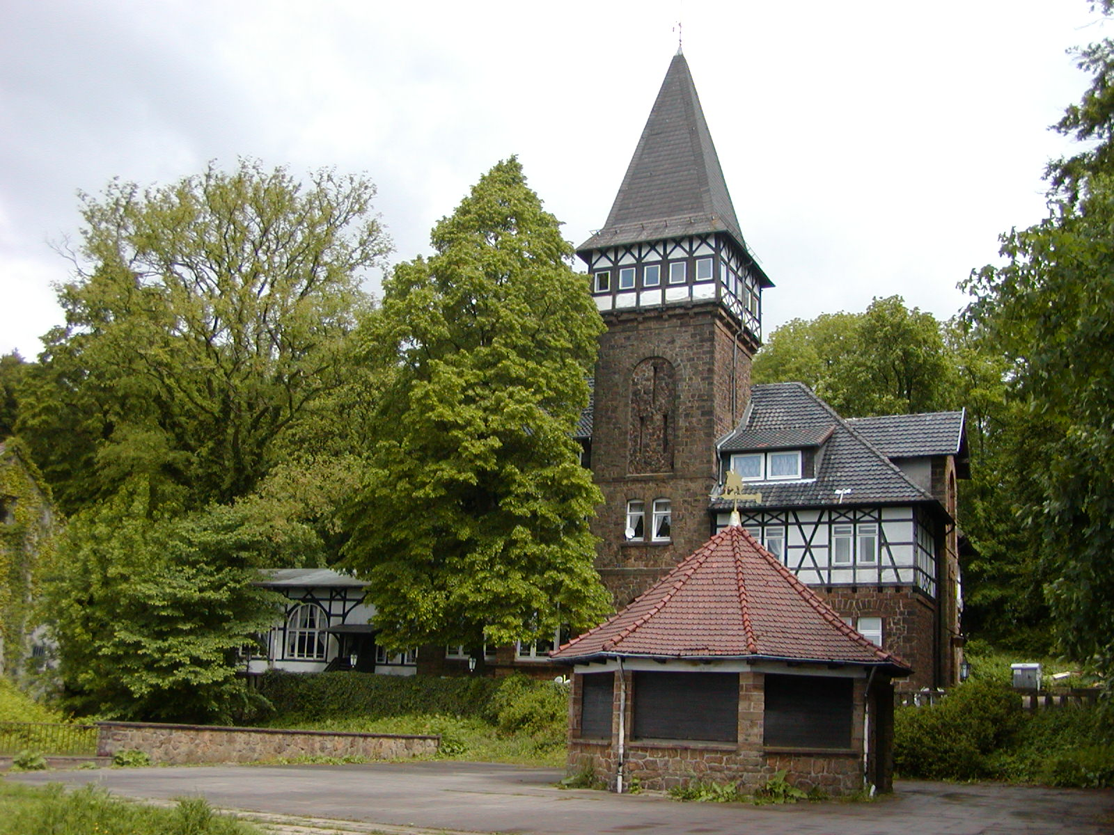 Hotel/Restaurant „Wittekindsburg“ im Areal der Fliehburg/Wallanlage Wittekindsburg This is a photograph of an architectural monument.